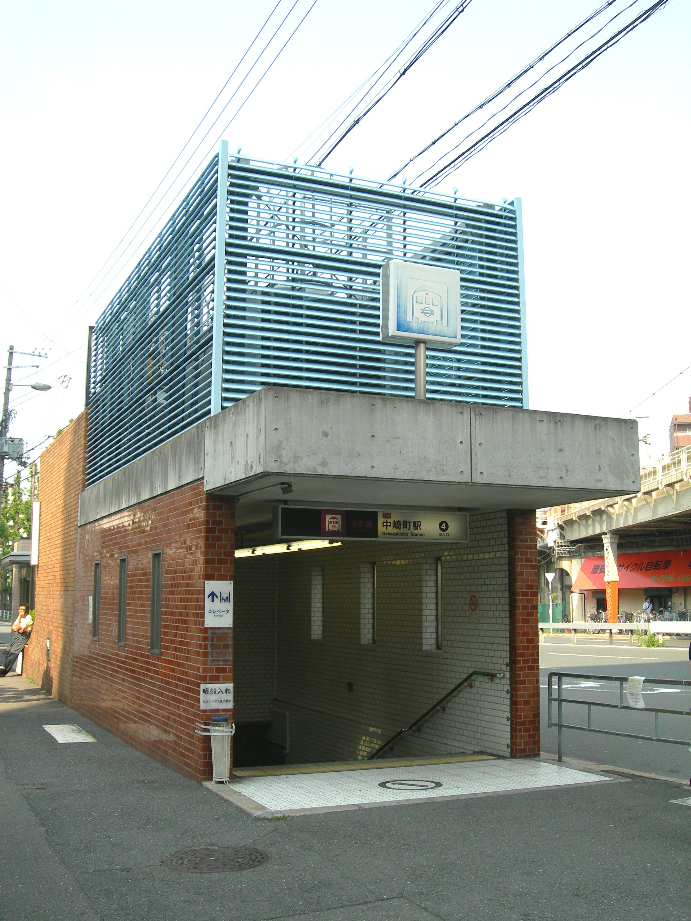 大阪市営地下鉄中崎町駅